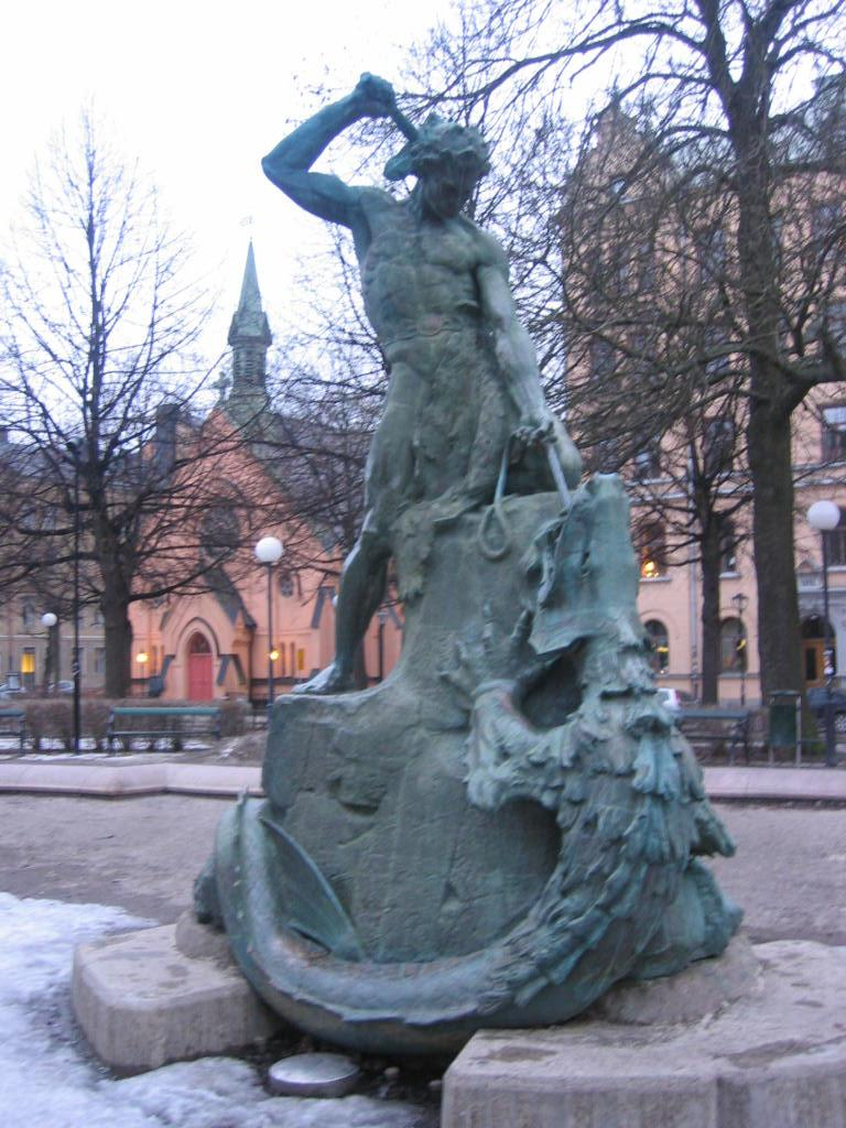 Skulptur och fontän på Mariatorget, Stockholm.